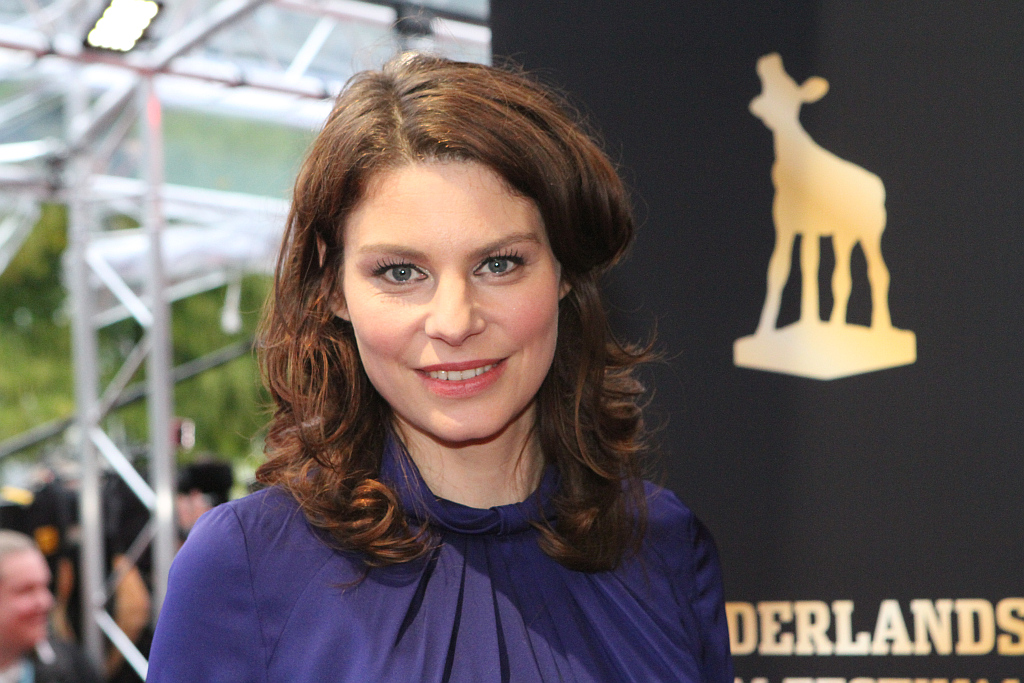 Rifka Lodeizen bij de uitreiking van Gouden Kalveren op het Nederlands Filmfestival